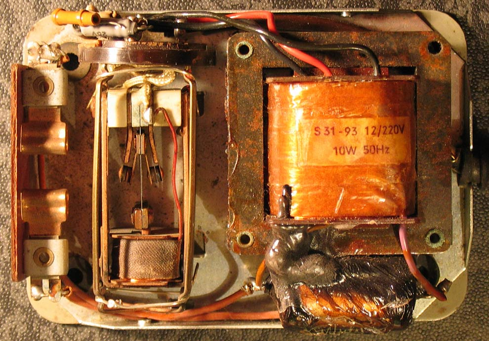 Historischer, elektromechanischer Zerhacker (Wechselrichter)